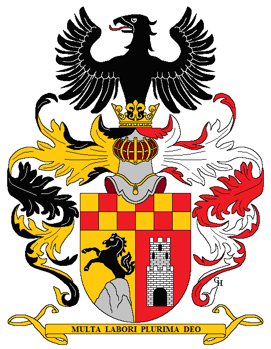 Wappen des österreichischen Juristen und Präsidenten des Generalrats der Anglo-Österreichischen Bank Julius Gustav Landesberger (1865–1920), verliehen anlässlich seiner Erhebung in den österreichischen Adelsstand mit dem Prädikat "von Antburg" 1916. Zeichnung von Gerd Hruška ( Für weitere Informationen zu dieser Standeserhebung siehe Arno Kerschbaumer, Nobilitierungen unter der Regentschaft Kaiser Franz Joseph I. / I. Ferenc József király (1914–1916), Graz 2017 (ISBN 978-3-9504153-2-2), S. 70, 234, 236 sowie (